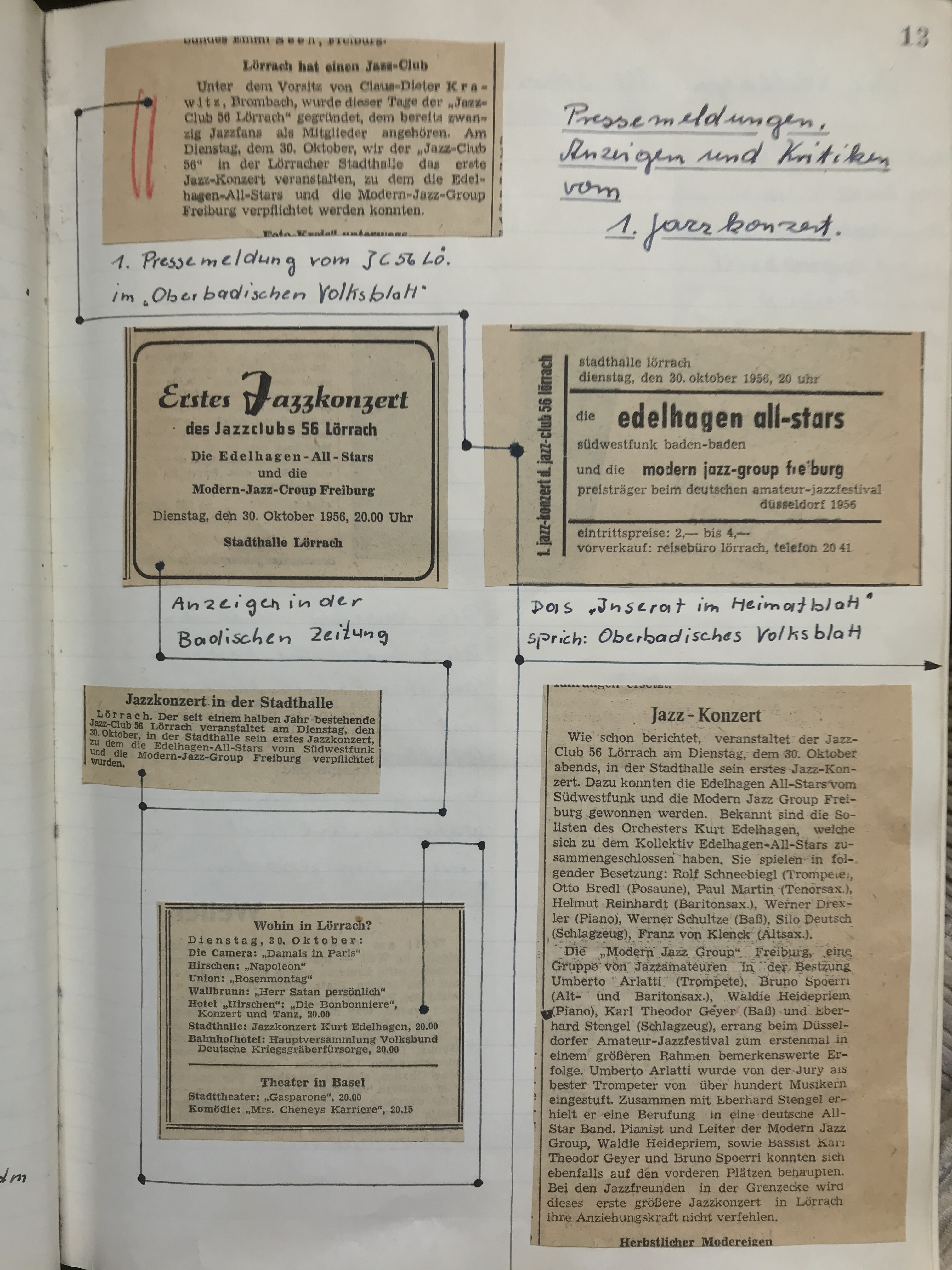 Beschreibung des ersten Jazzkonzerts, welches der Jazzclub 56 Lörrach e.V. am 30. Oktober 1956 durchgeführt hat. Gesammelte Zeitungsausschnitte mit handschriftlichen Erläuterungen.